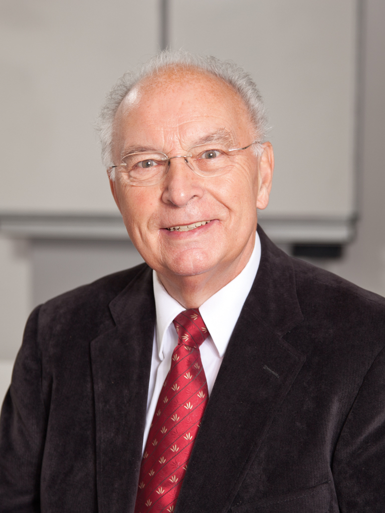 Prof. Dr. Eberhard Meumann (2018)